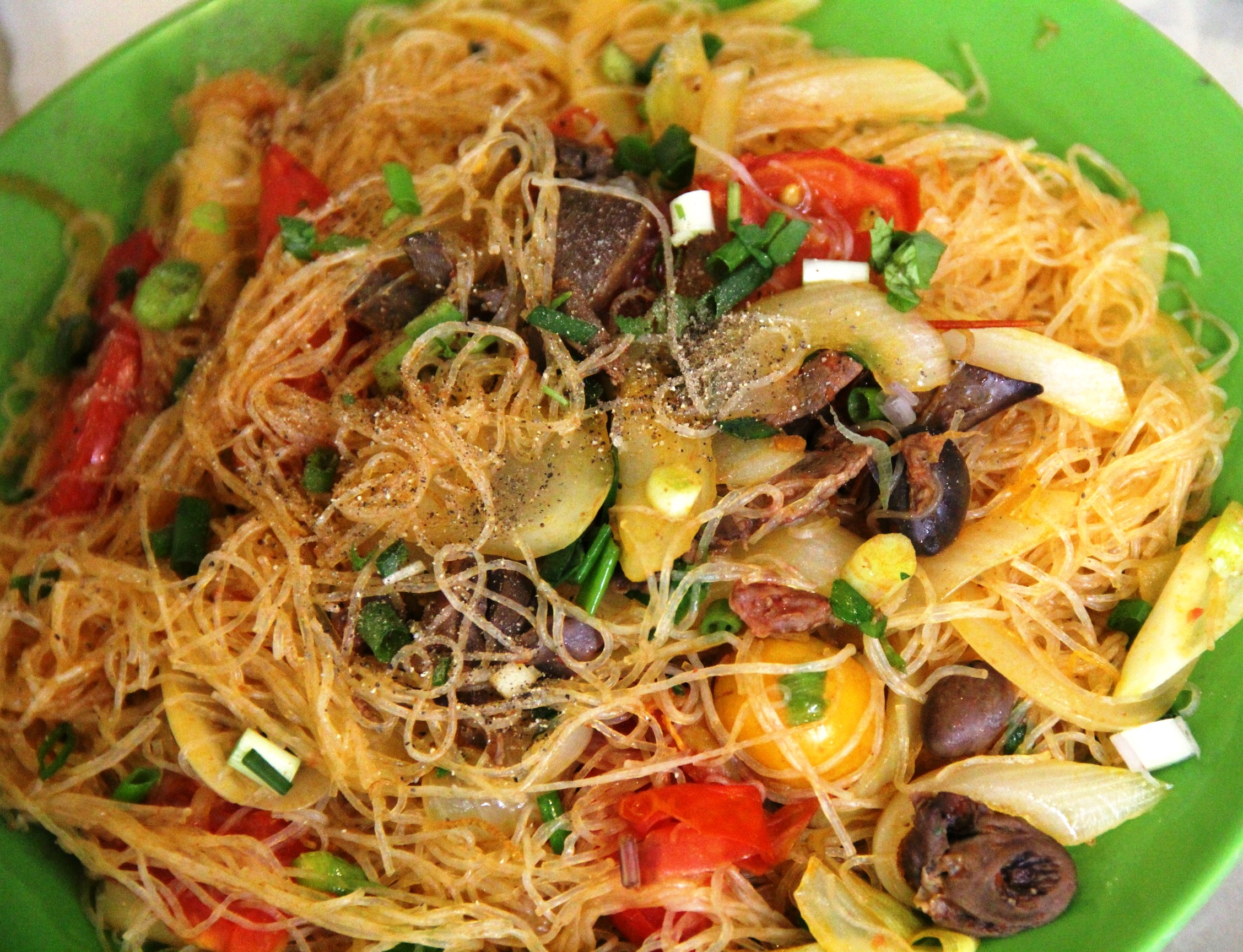 Miến xào lòng cật, tháng 8 năm 2018